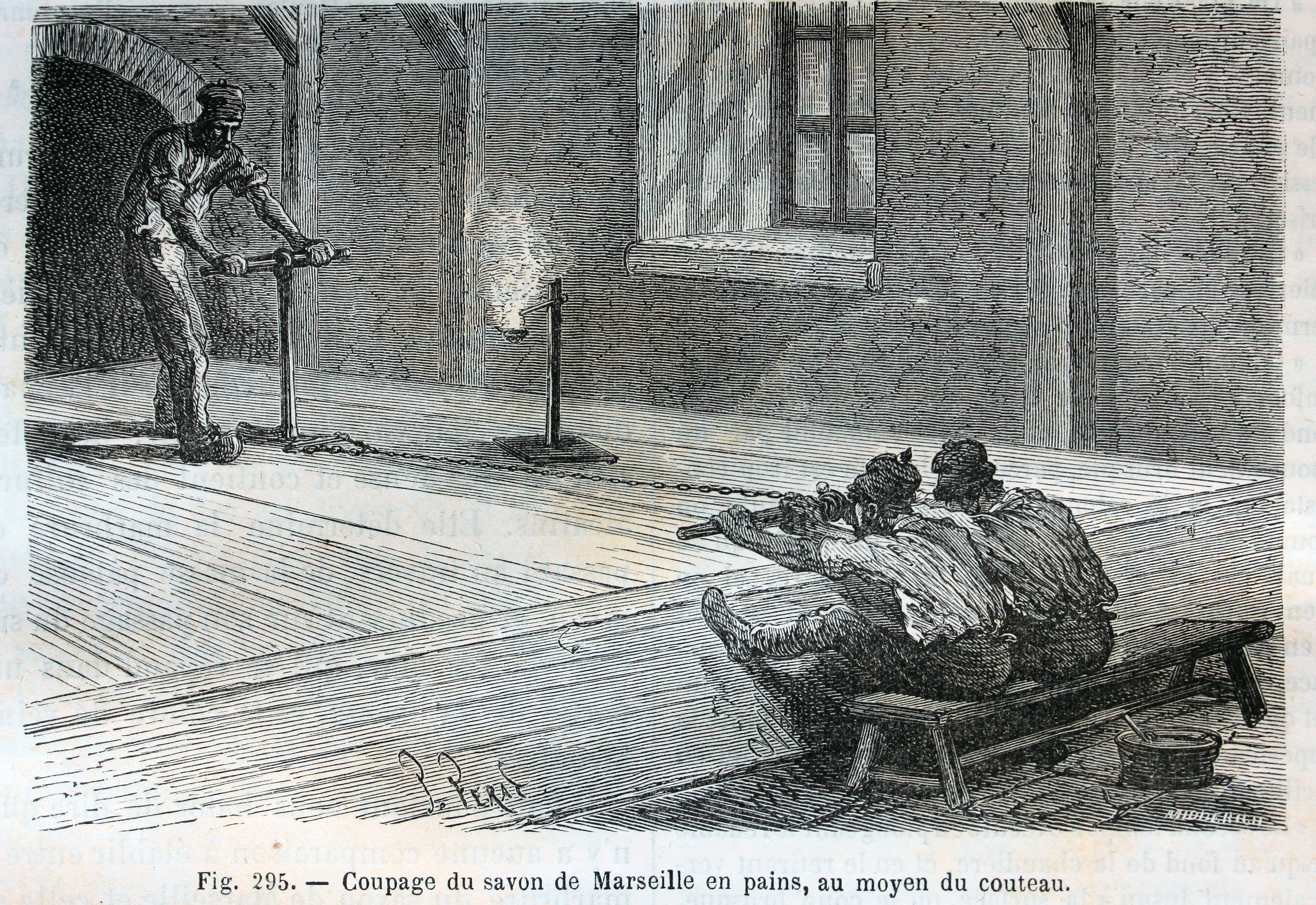 Ilustraciones de la obra : Les merveilles de l'industrie ou, Description des principales industries modernes / par Louis Figuier. - Paris : Furne, Jouvet, [1873-1877]. - Tome I